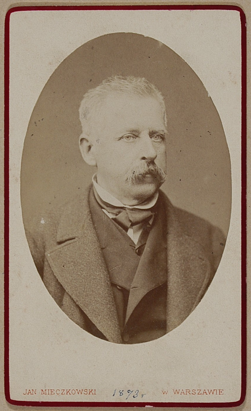 Edward Czapski